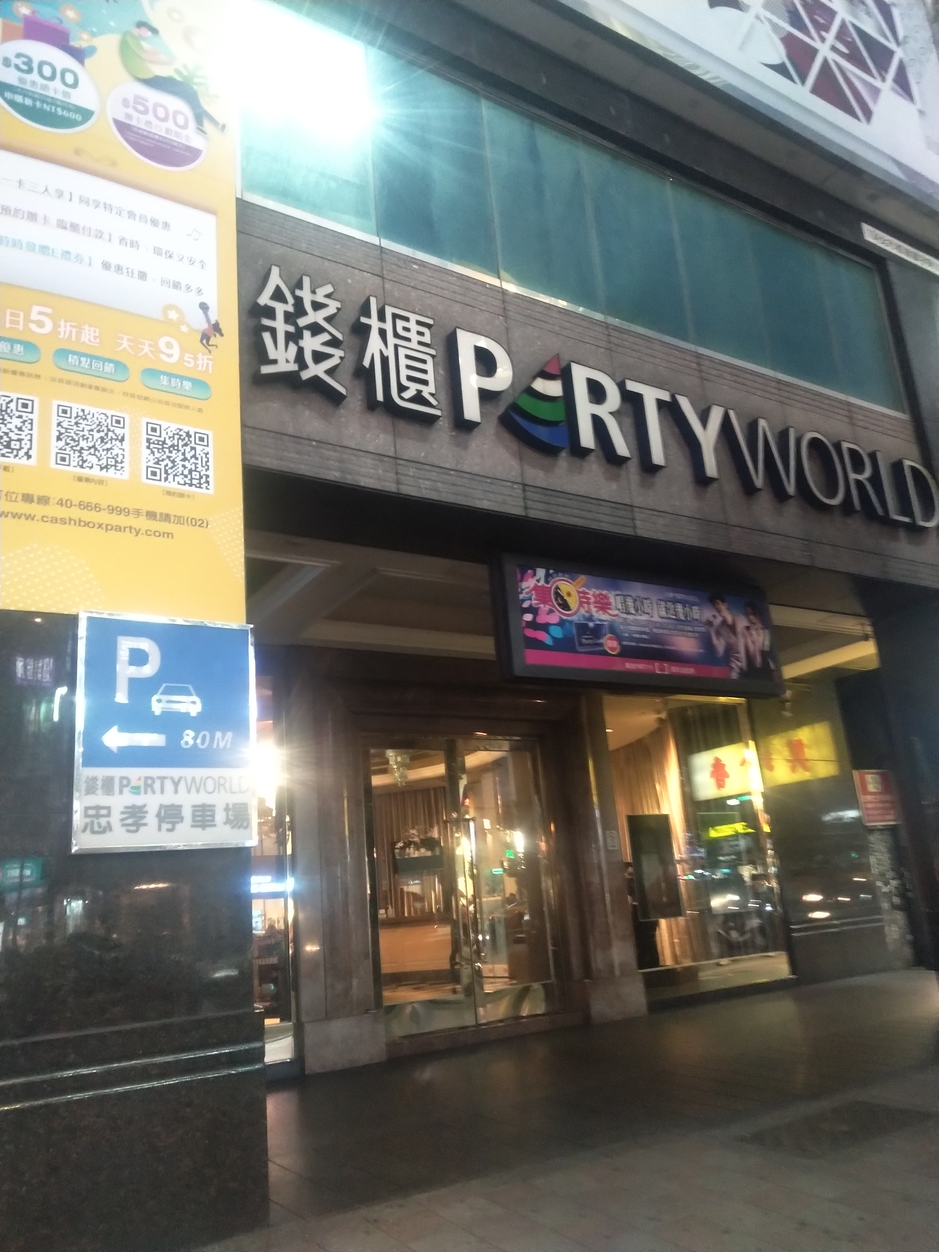 中文（台灣）: 正常營業的錢櫃Sogo店